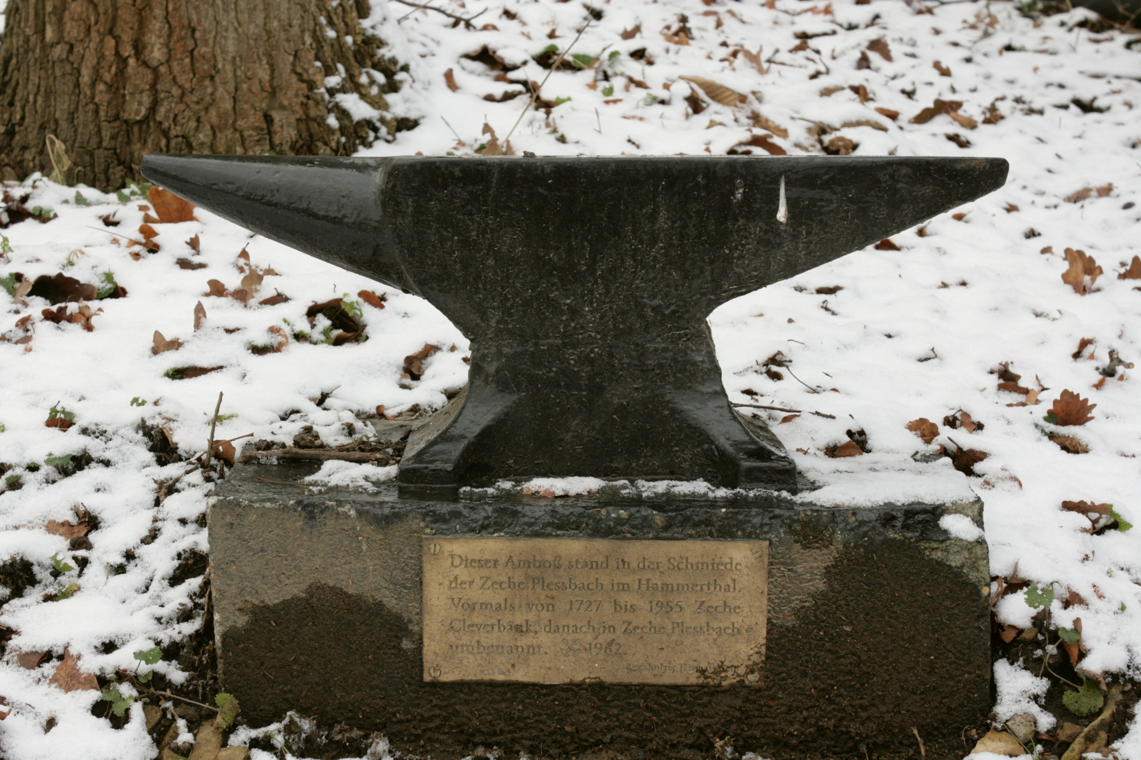 Gedenkstein/Amboss am Wetterschornstein Buchholz in Witten